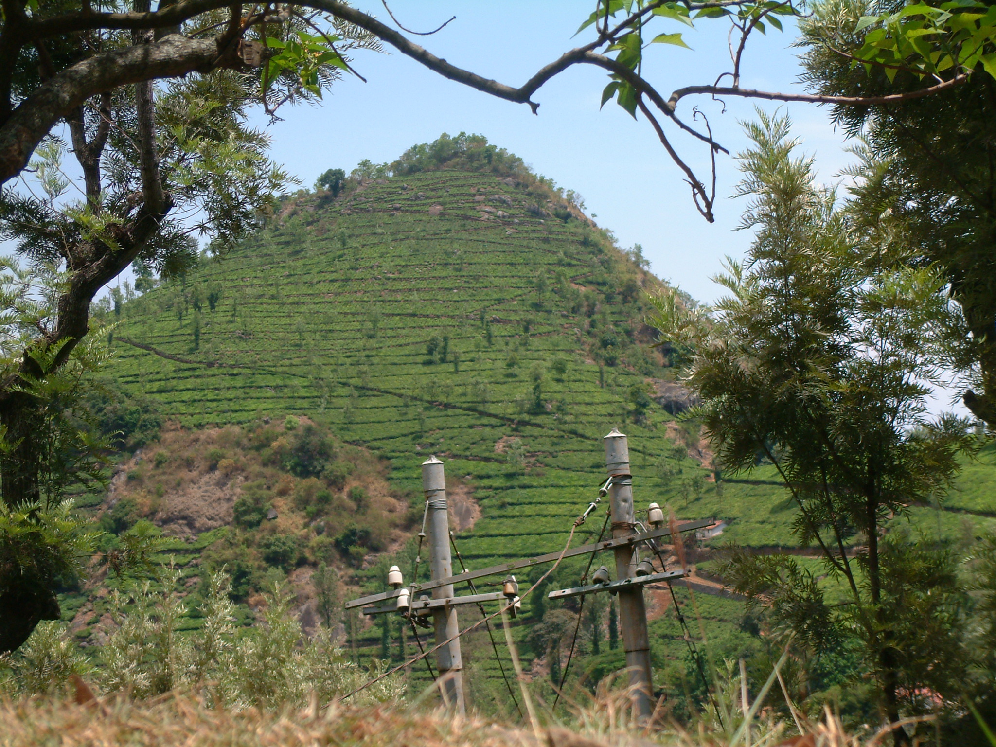 എടുത്തത് ചള്ളിയാൻ